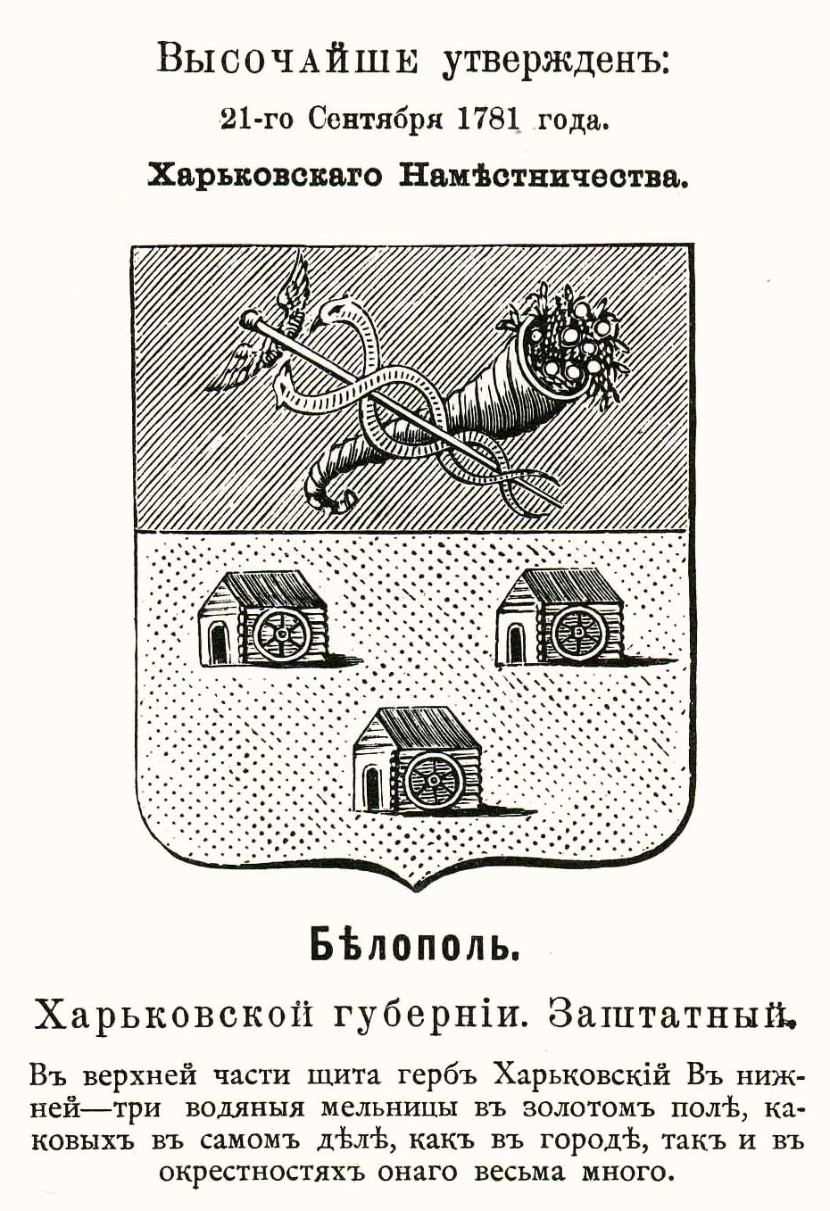 Official Russian Empire coat of arms Belopol. Герб заштатного города Российской Империи Белополь Харьковской губернии с официальным описанием в Гербовнике Винклера.